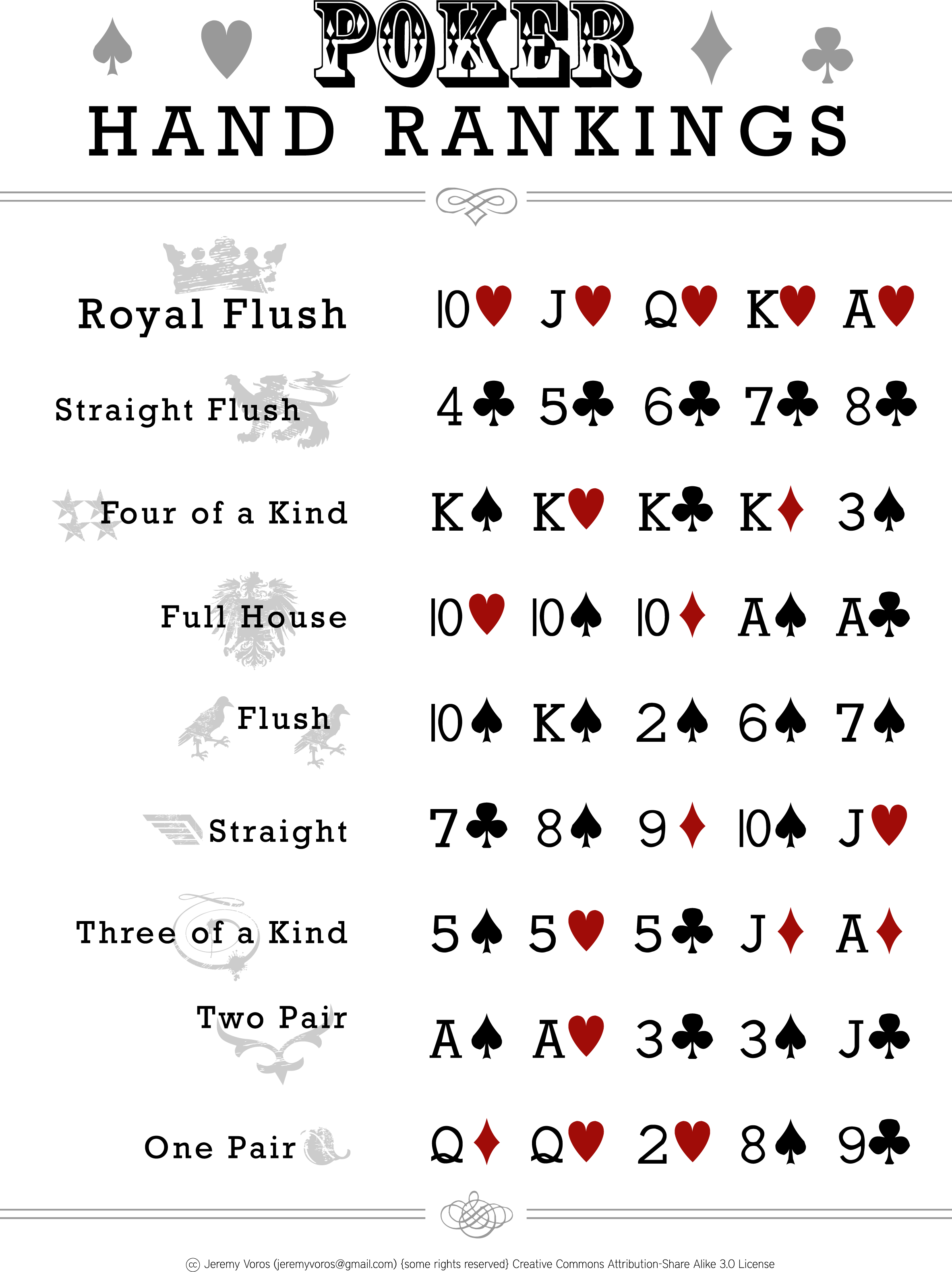 Poker Hand Rankings